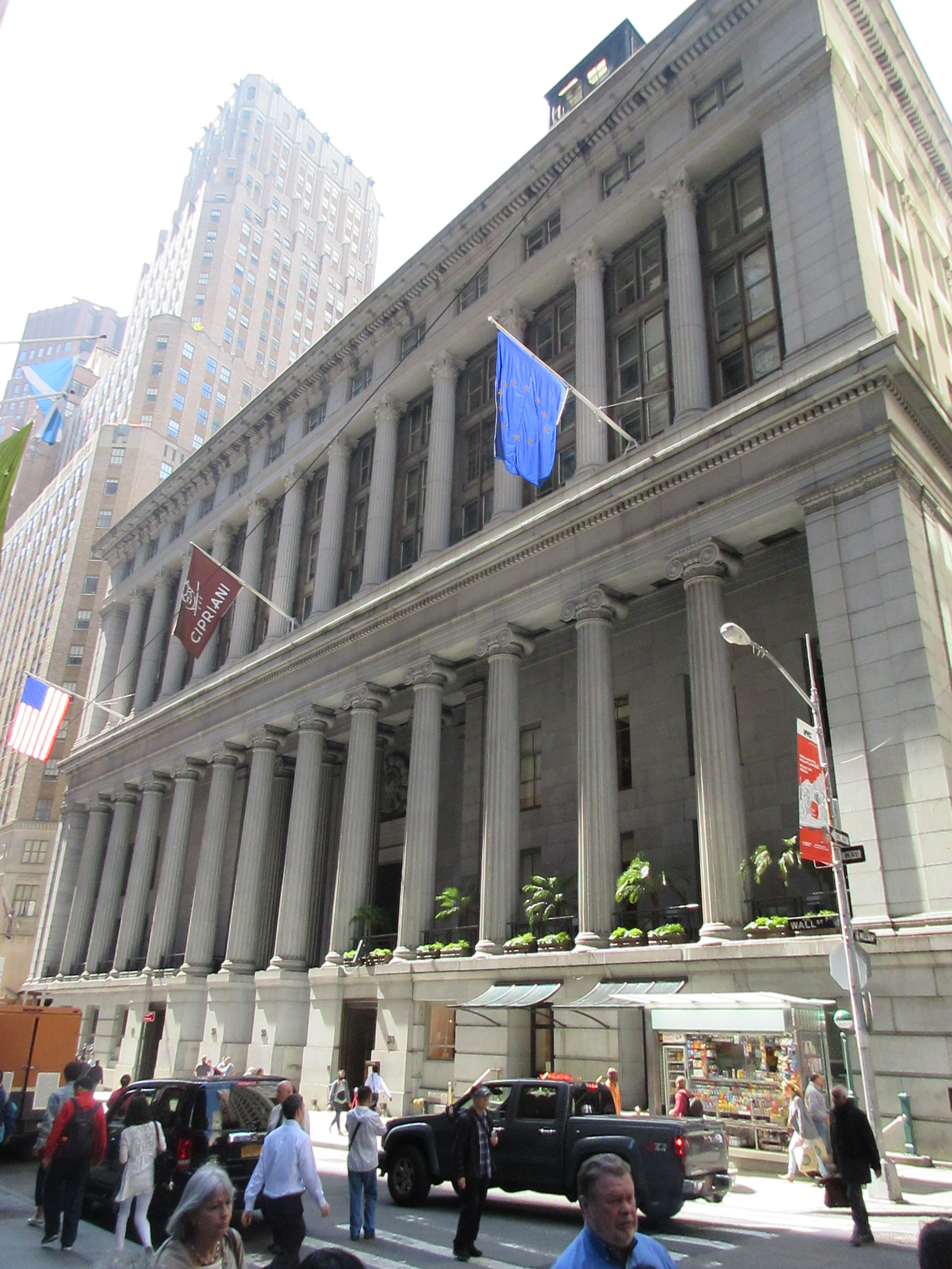 New York